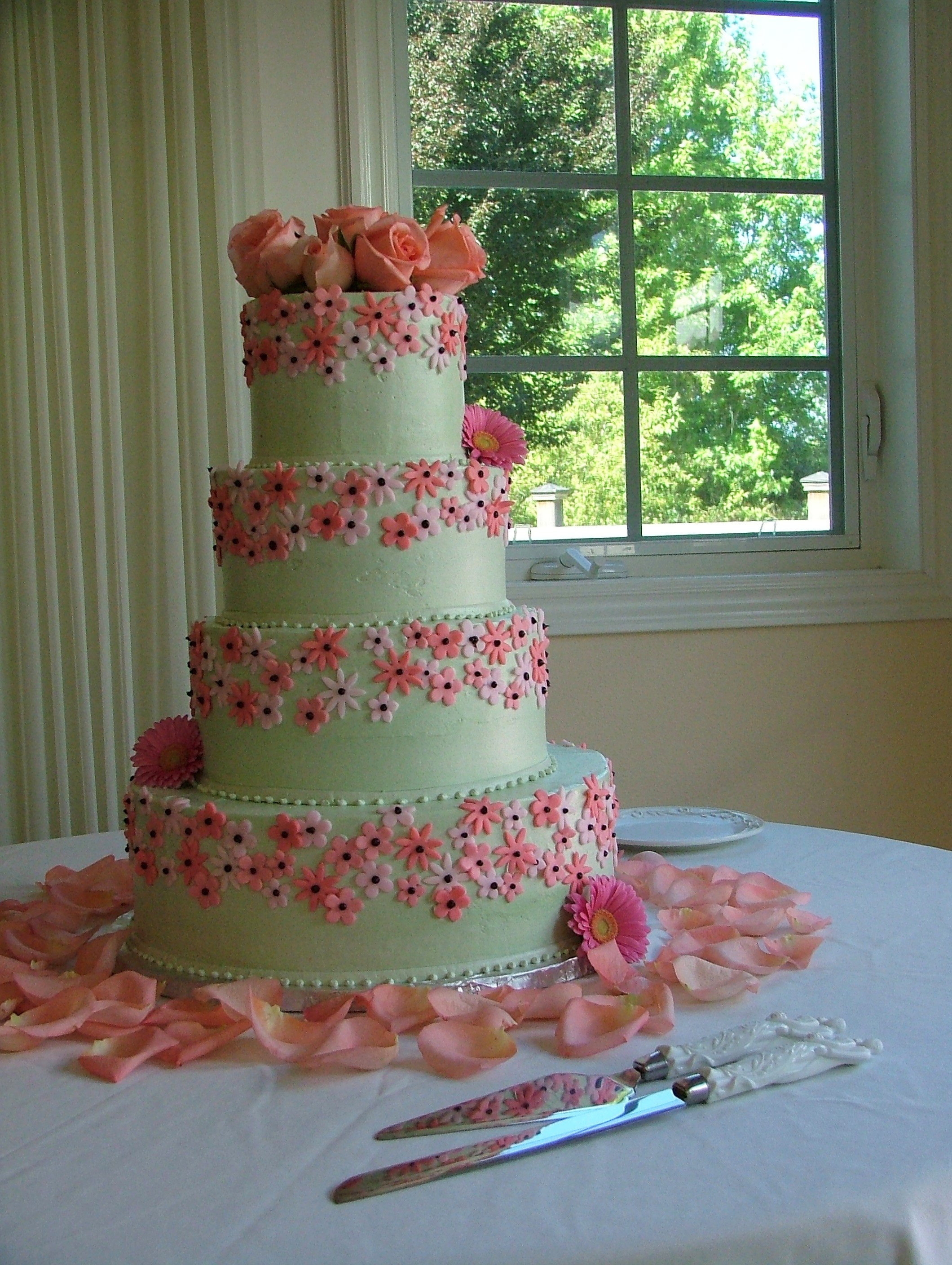 Tort weselny.